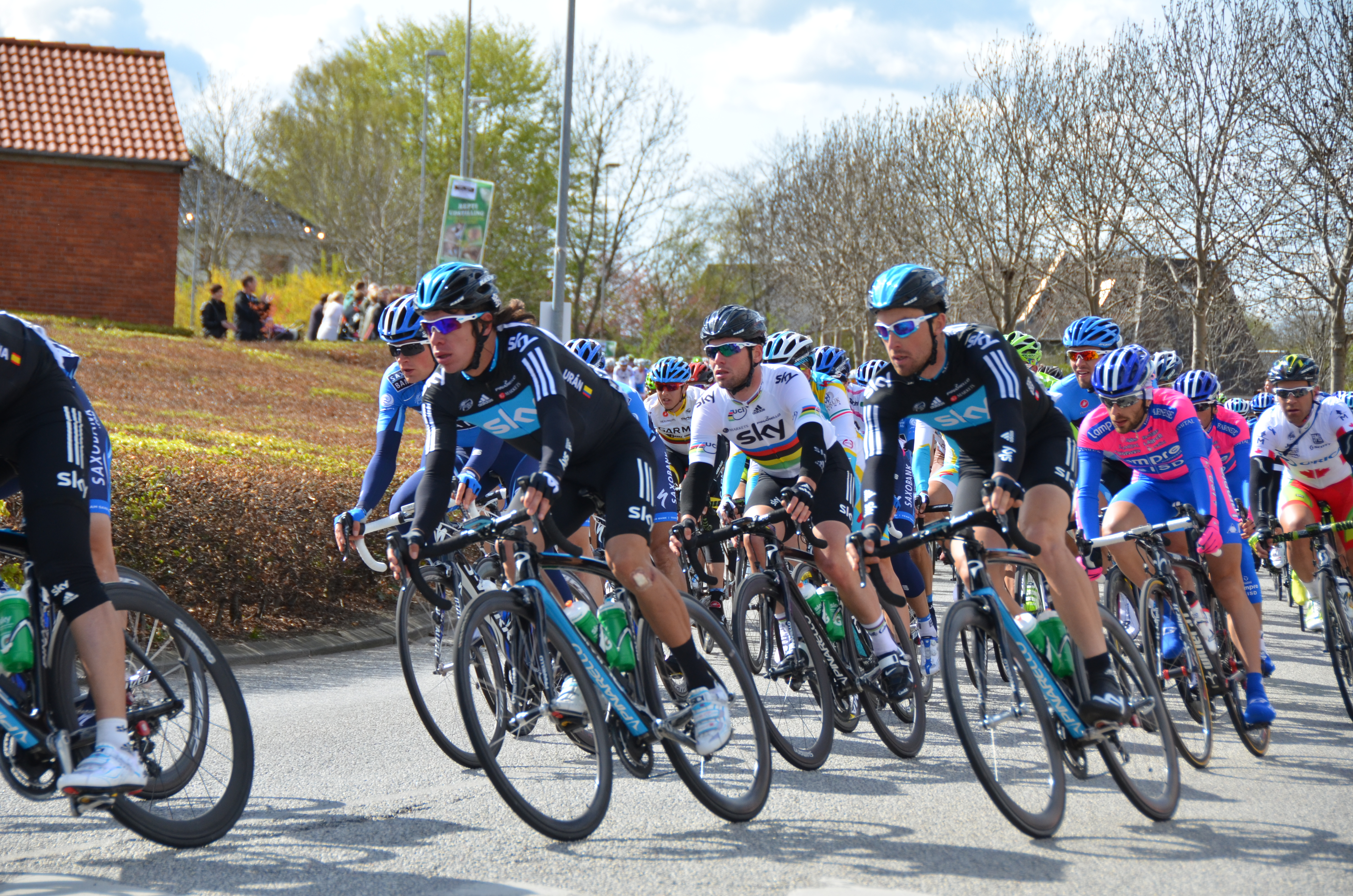 Giro d' Italia Holstebro Danmark Denmark